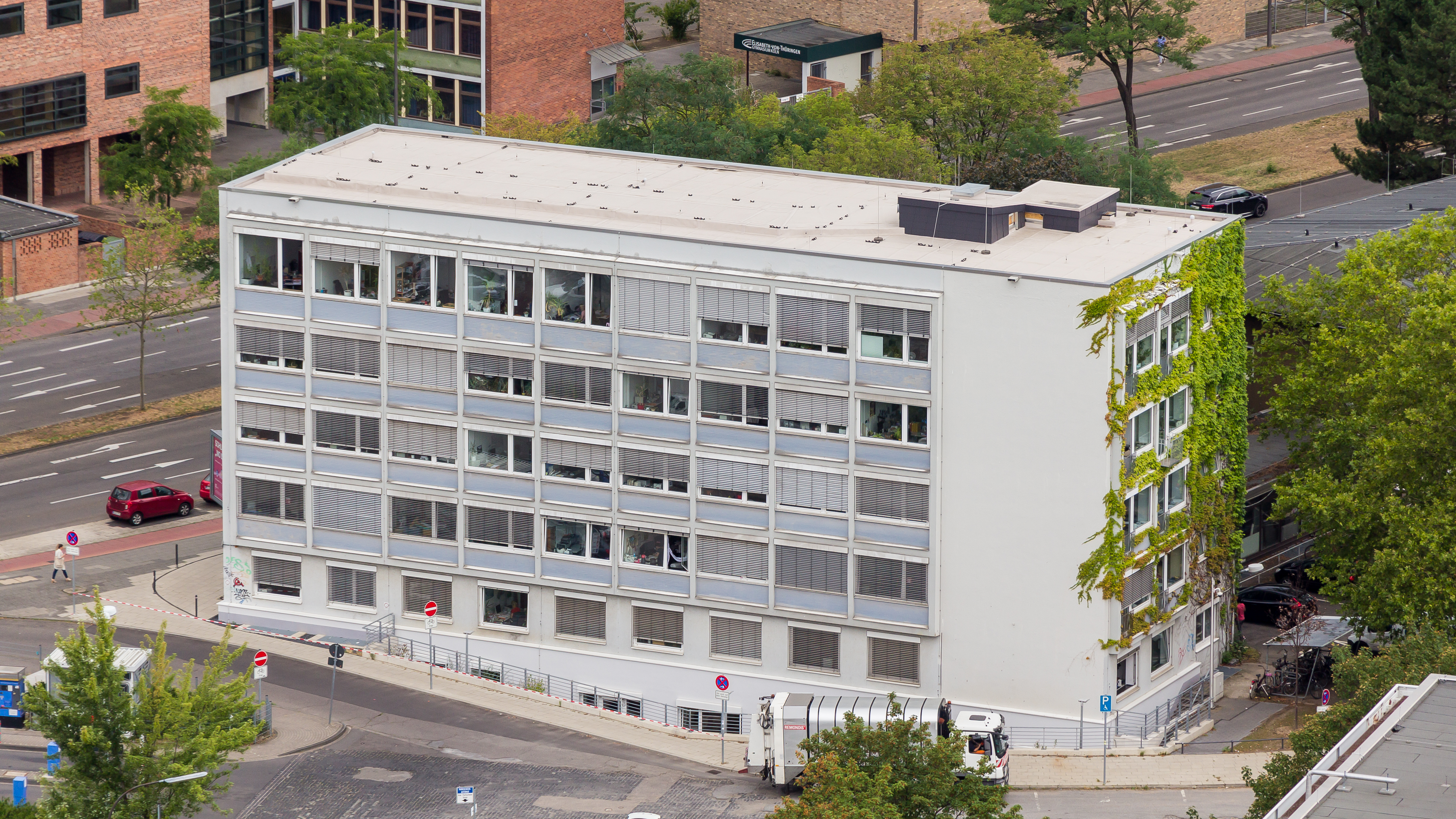 Kölner Studierendenwerk, Universitätsstraße 16, Köln